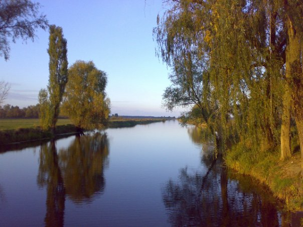 речка